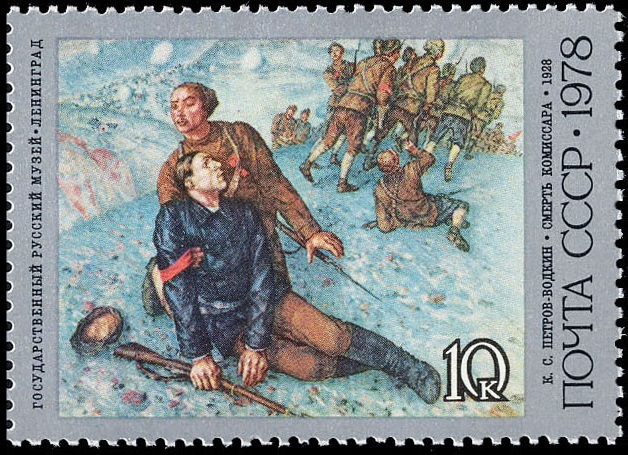 К. С. Петров-Водкин. «Смерть комиссара». 1928 г.